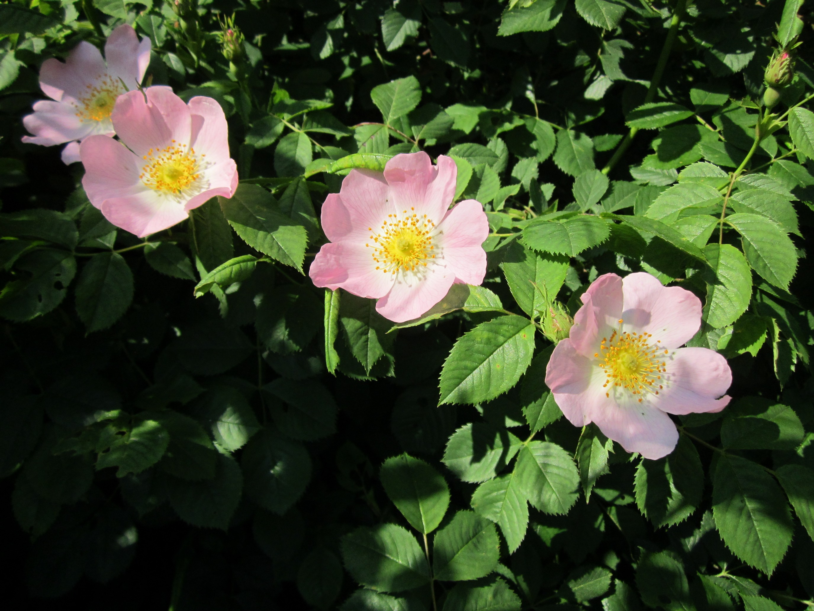 Vogesen-Rose (Rosa dumalis) bei Reilingen